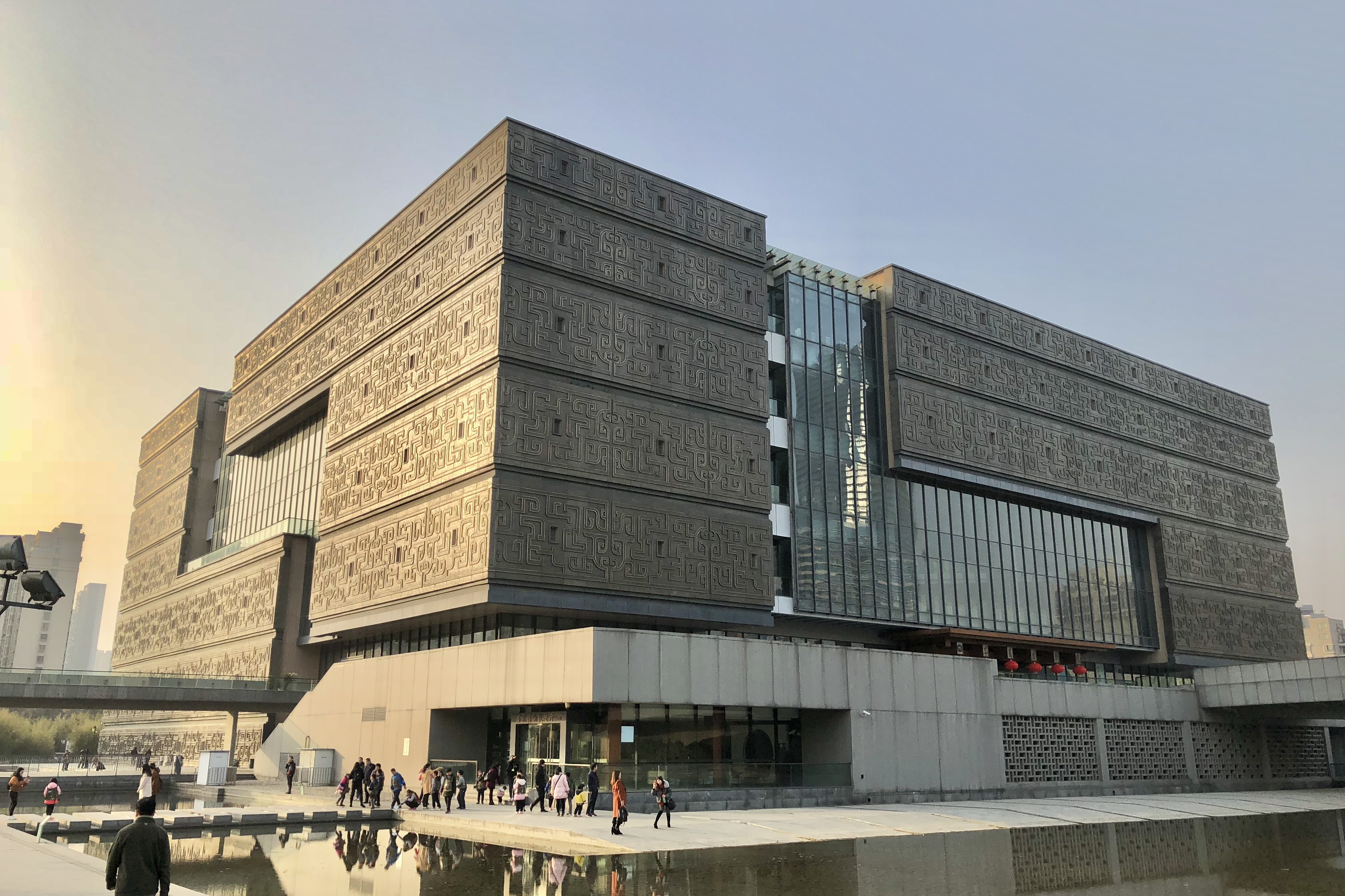 中文（中国大陆）: 安徽博物院新院正侧面